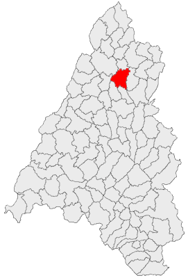 Categorie:Hărţi ale judeţului Bihor